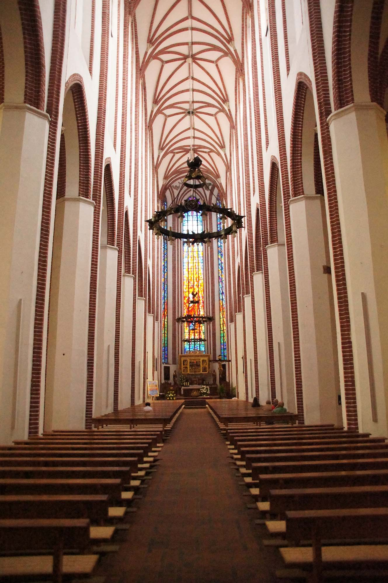 Brzeg, kościół par. p.w. św. Mikołaja, 1370, 1409-1416, XIX, 1959